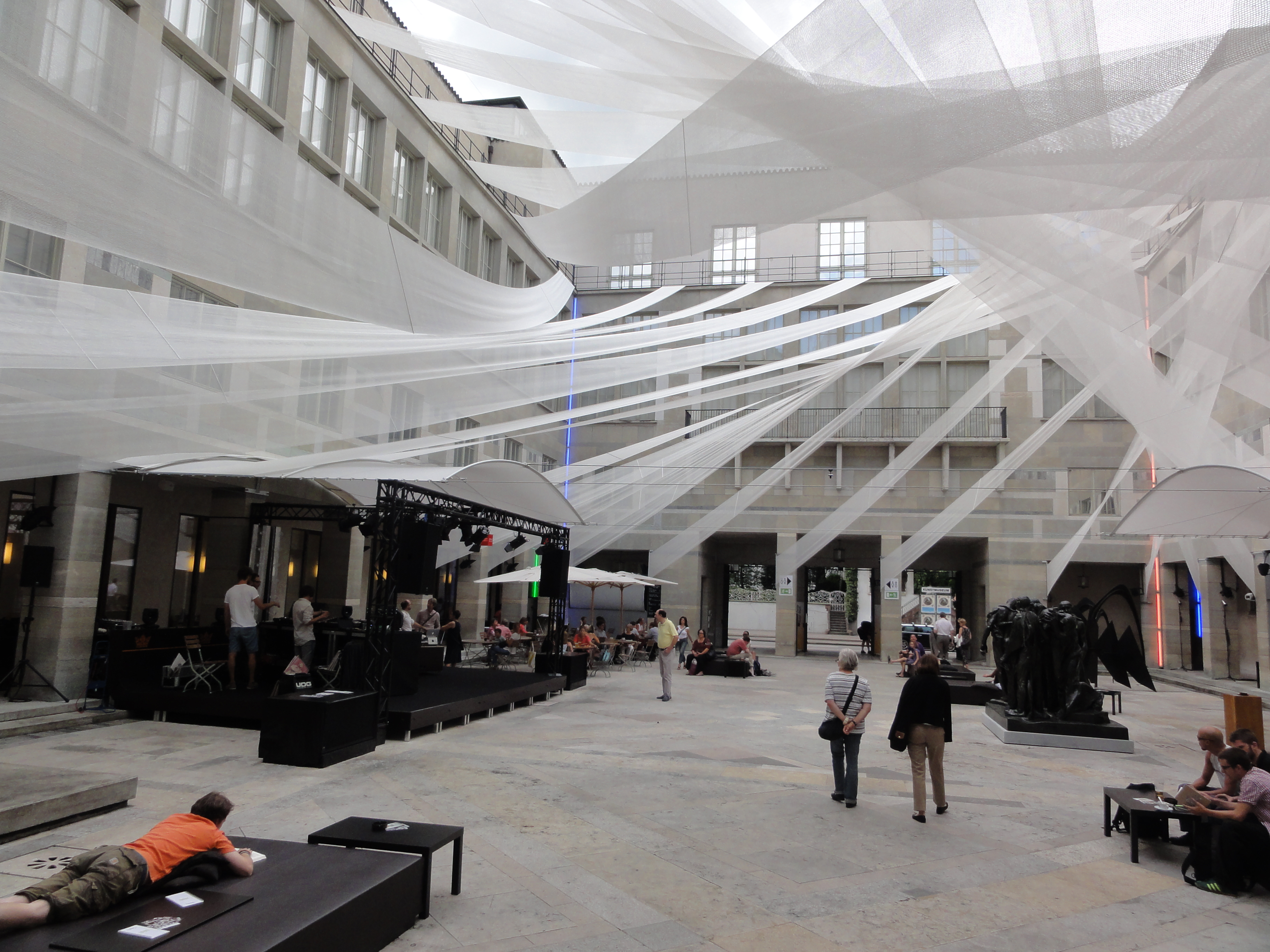 Basel — Kunstmuseum, Außenbereich: Blick Richtung Straße Info GPS data may be inaccurate. EXIF data regarding date and time may be inaccurate.